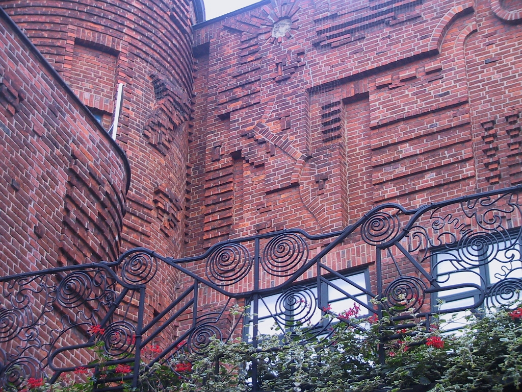 Balkon en achterwand in de Böttcherstraße in het centrum van Bremen. Geldt als voorbeeld van expressionisme in de bouwkunst.